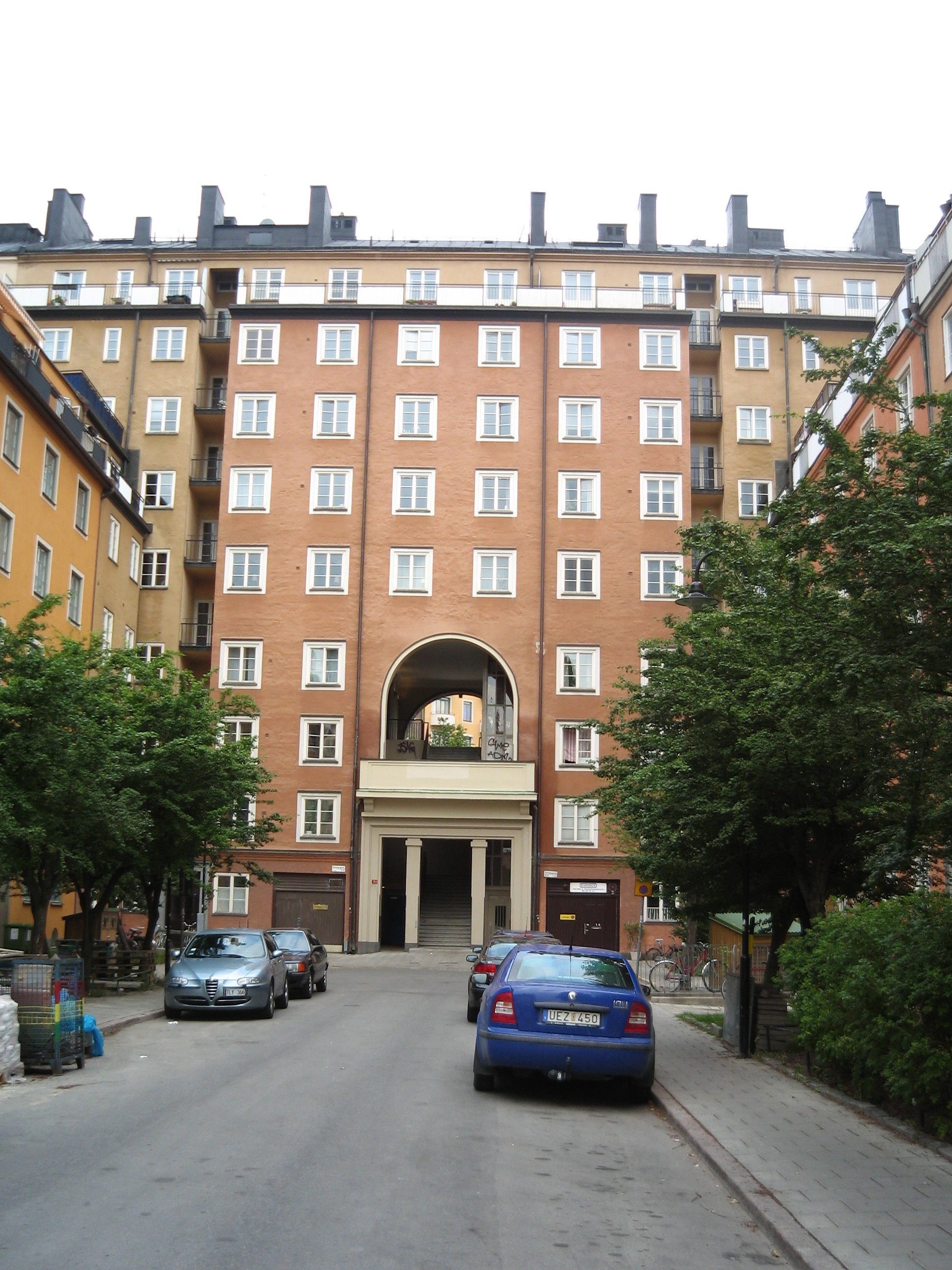 Vulcanusgatan i Atlasområdet, Vasastaden, Stockholm